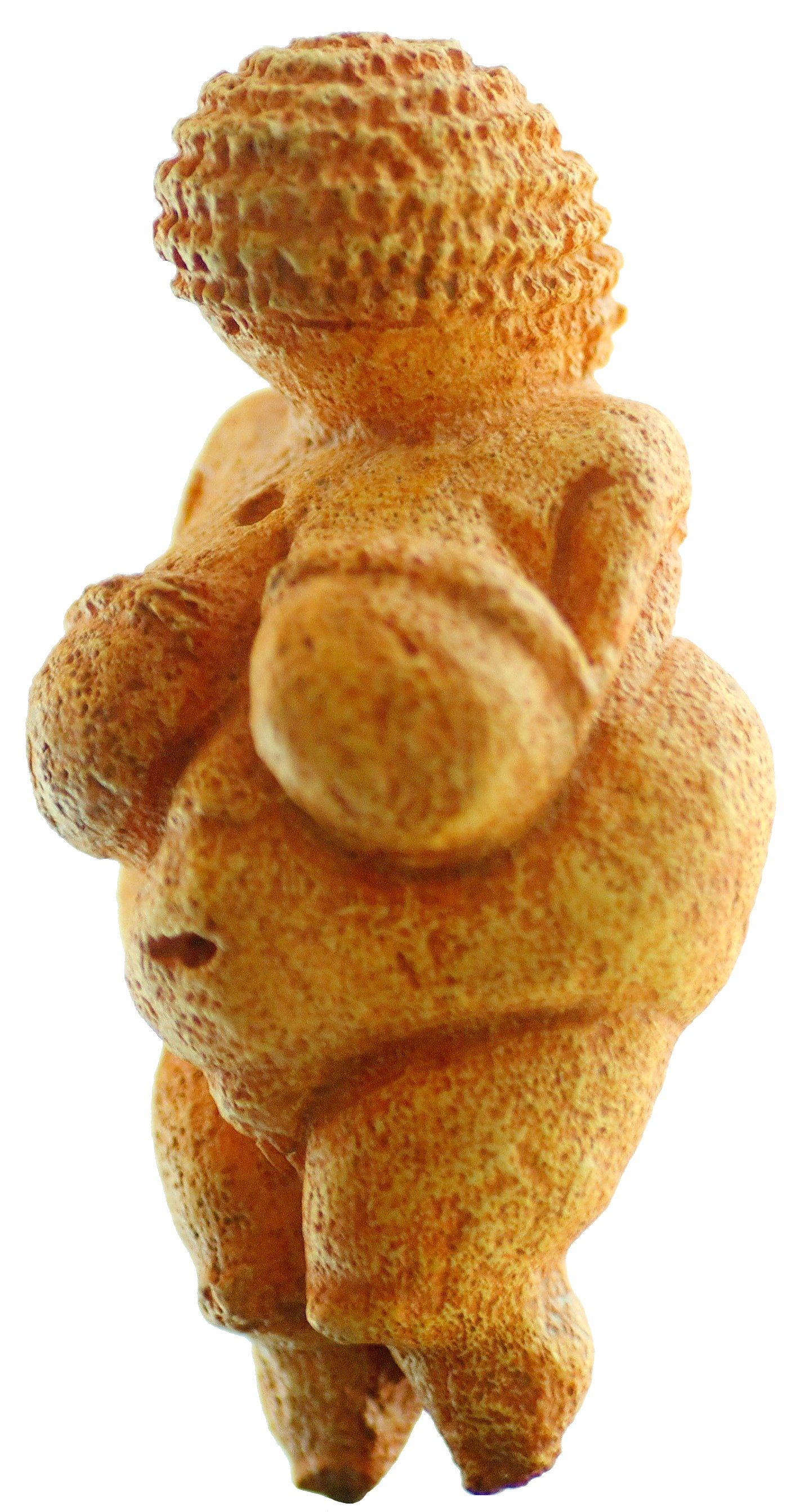 Venus von Willendorf